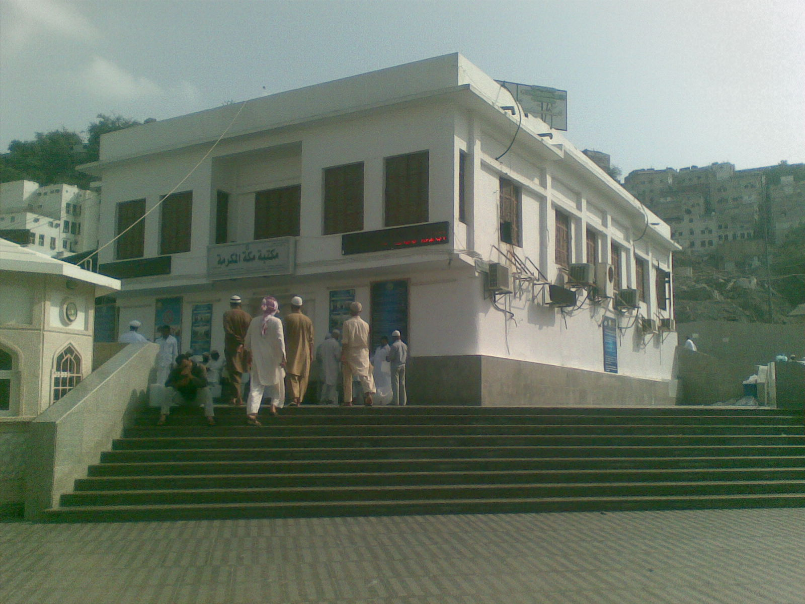 മക്കയിലെ സൂഖുല്ലൈലില്‍ മുഹമ്മദ്‌ നബി ജനിച്ച വീട്